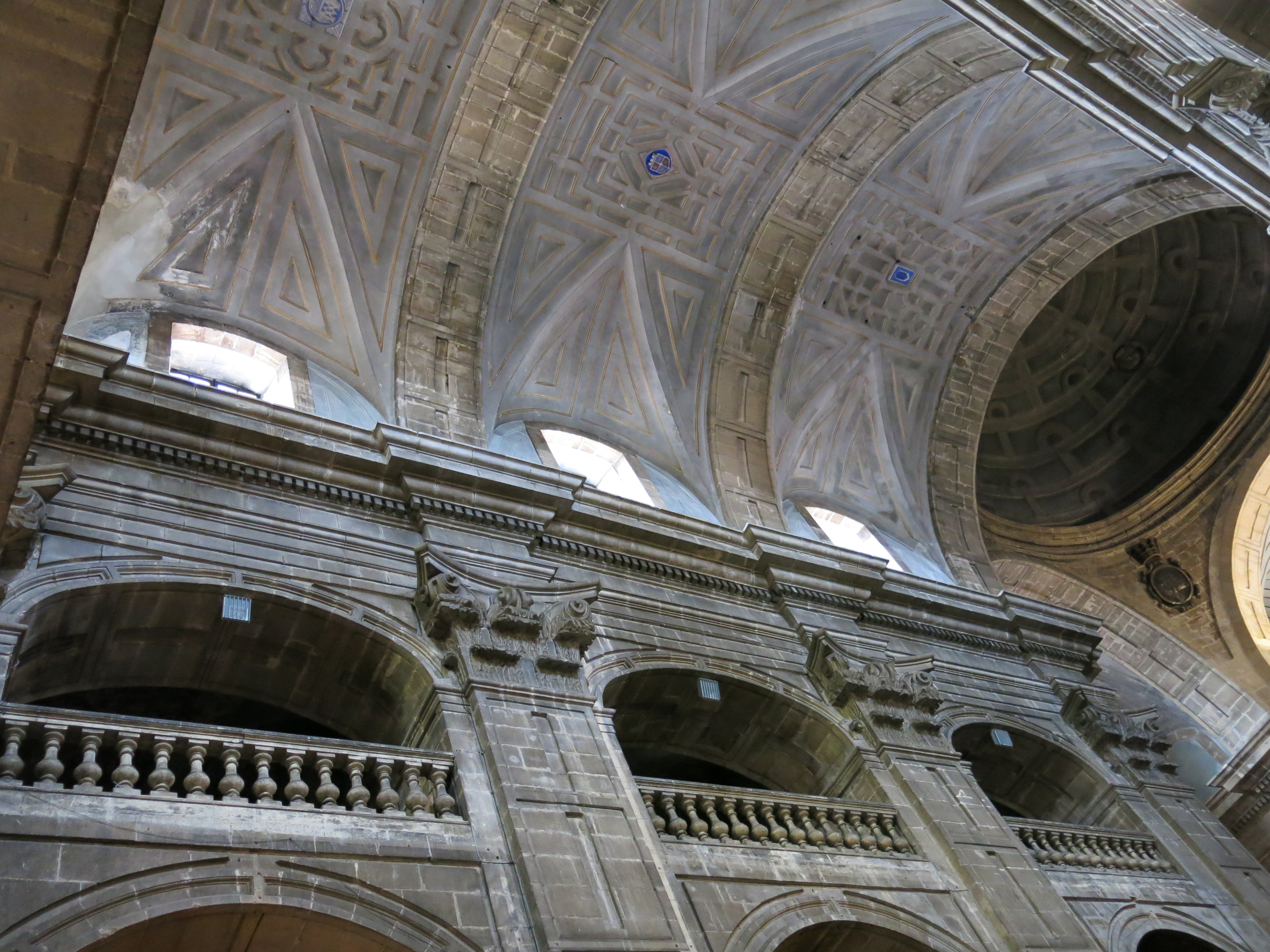 Iglesia de San Isidoro el Real